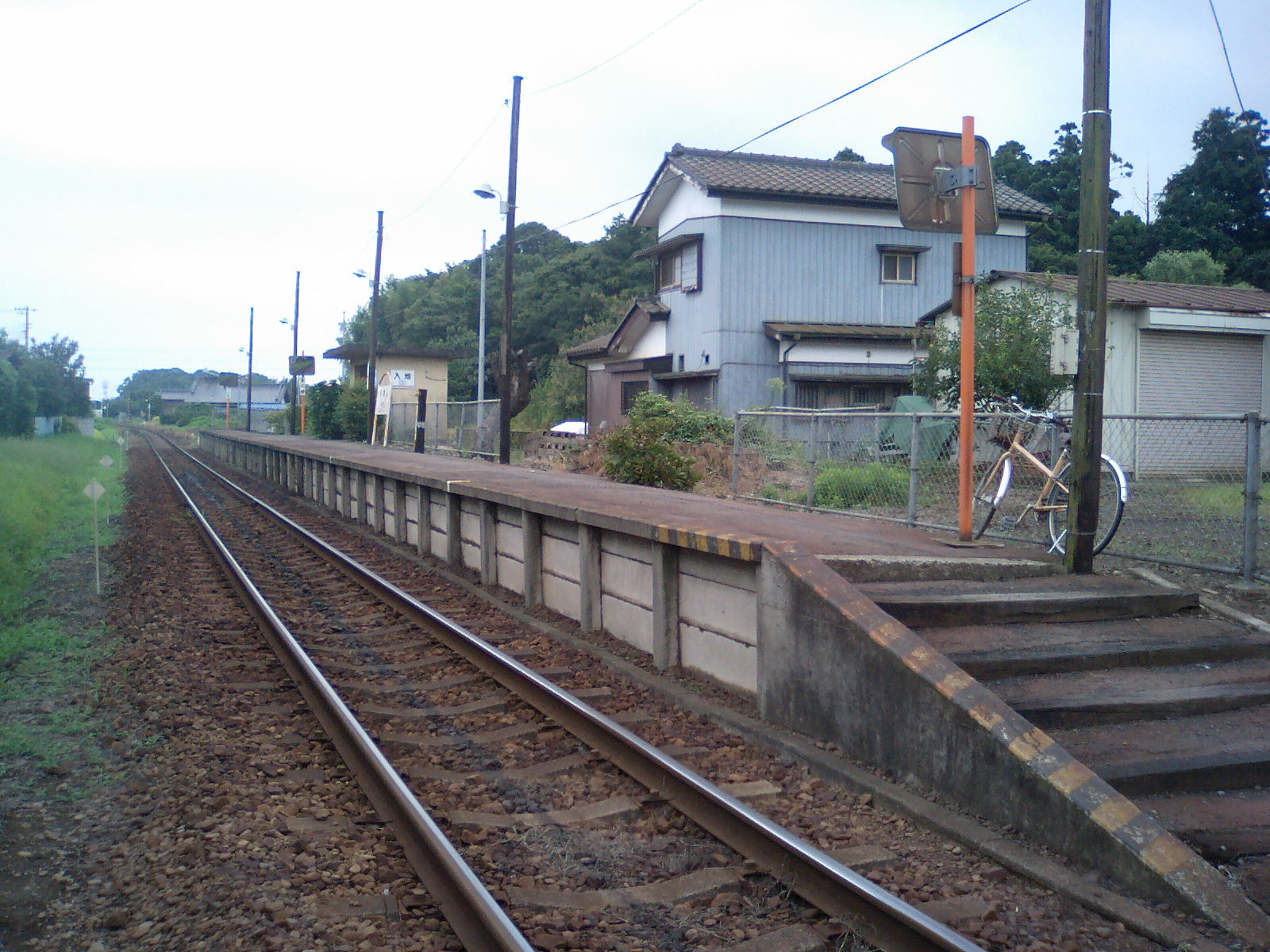 入地駅全景